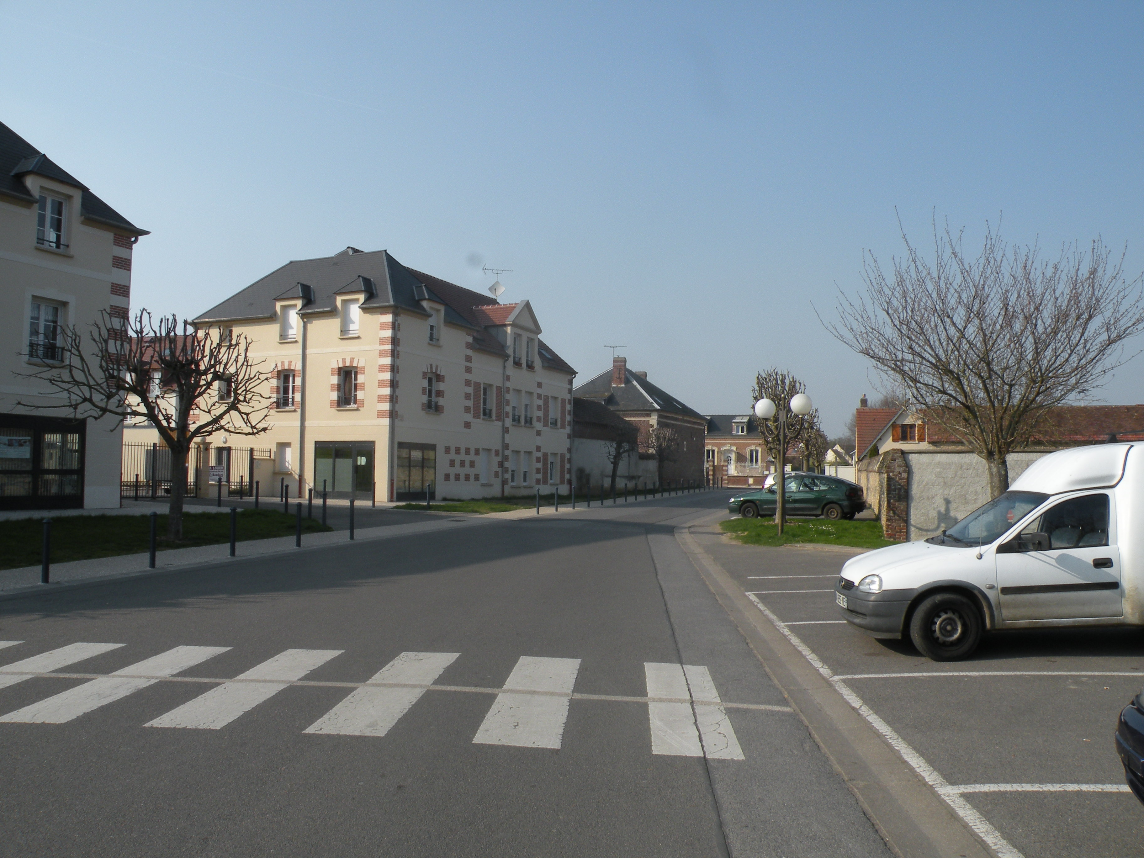 rue de Bailleul-sur-Thérain